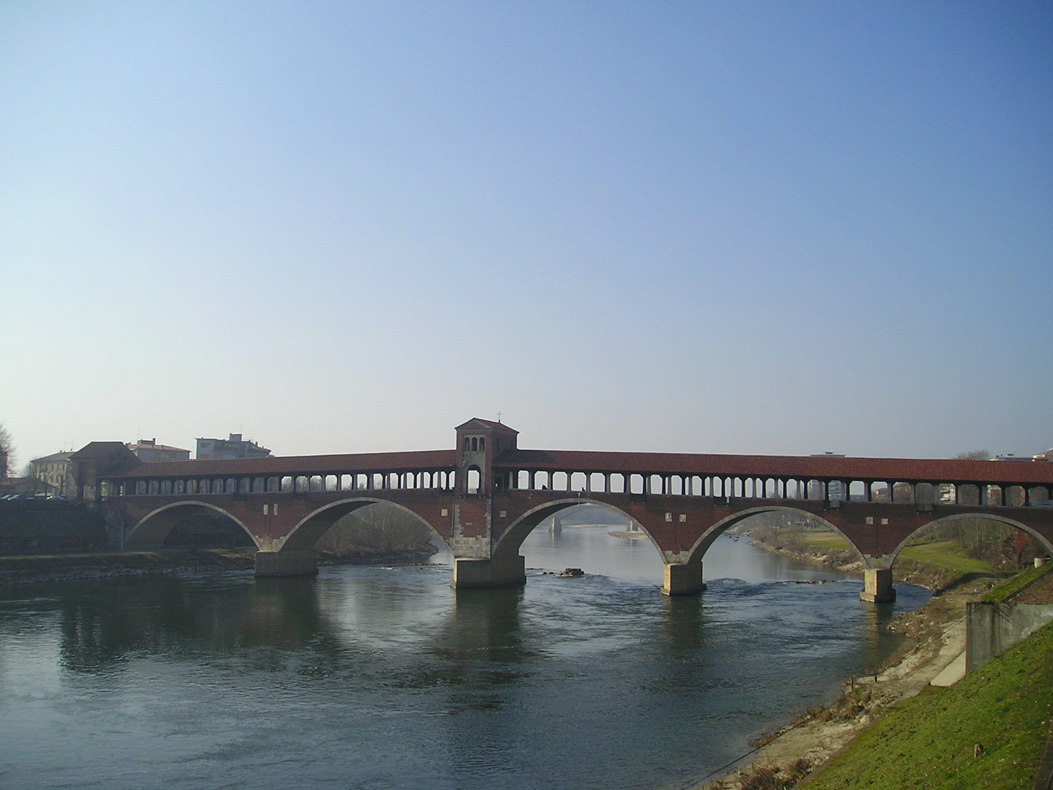 Il fiume Ticino ripreso a Pavia (febbraio 2004); autore Massimo Macconi